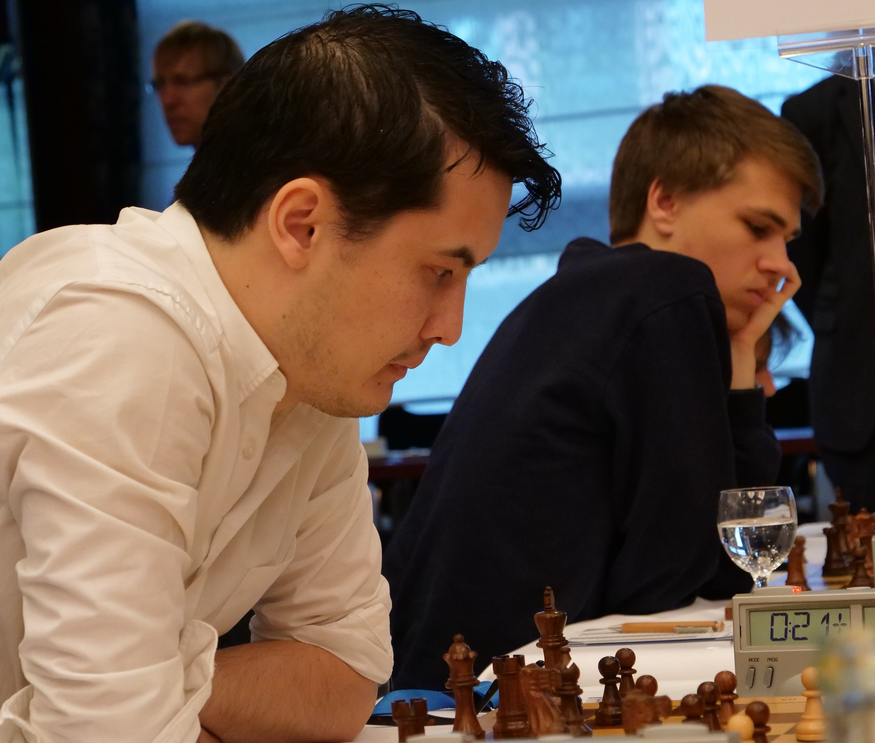 Howell und Svane - Bundesliga-Endrunde 30-4-2018